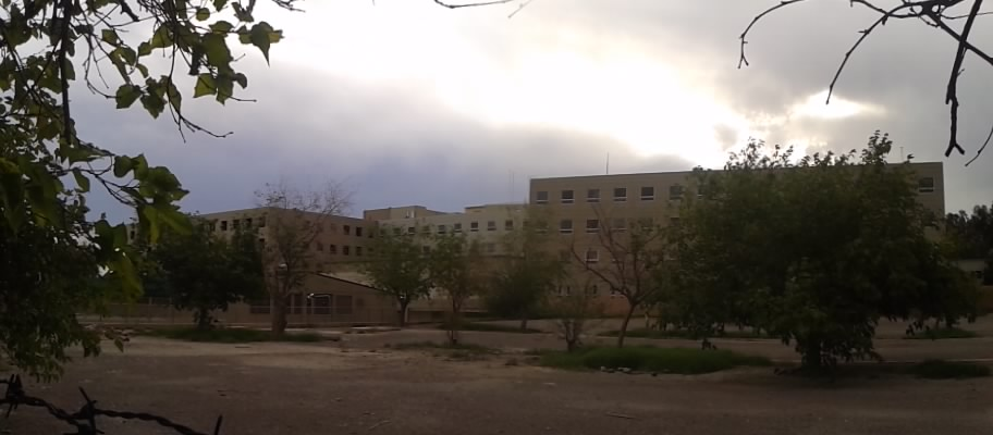 Ampliación en años recientes de 3 pisos en su parte posterior